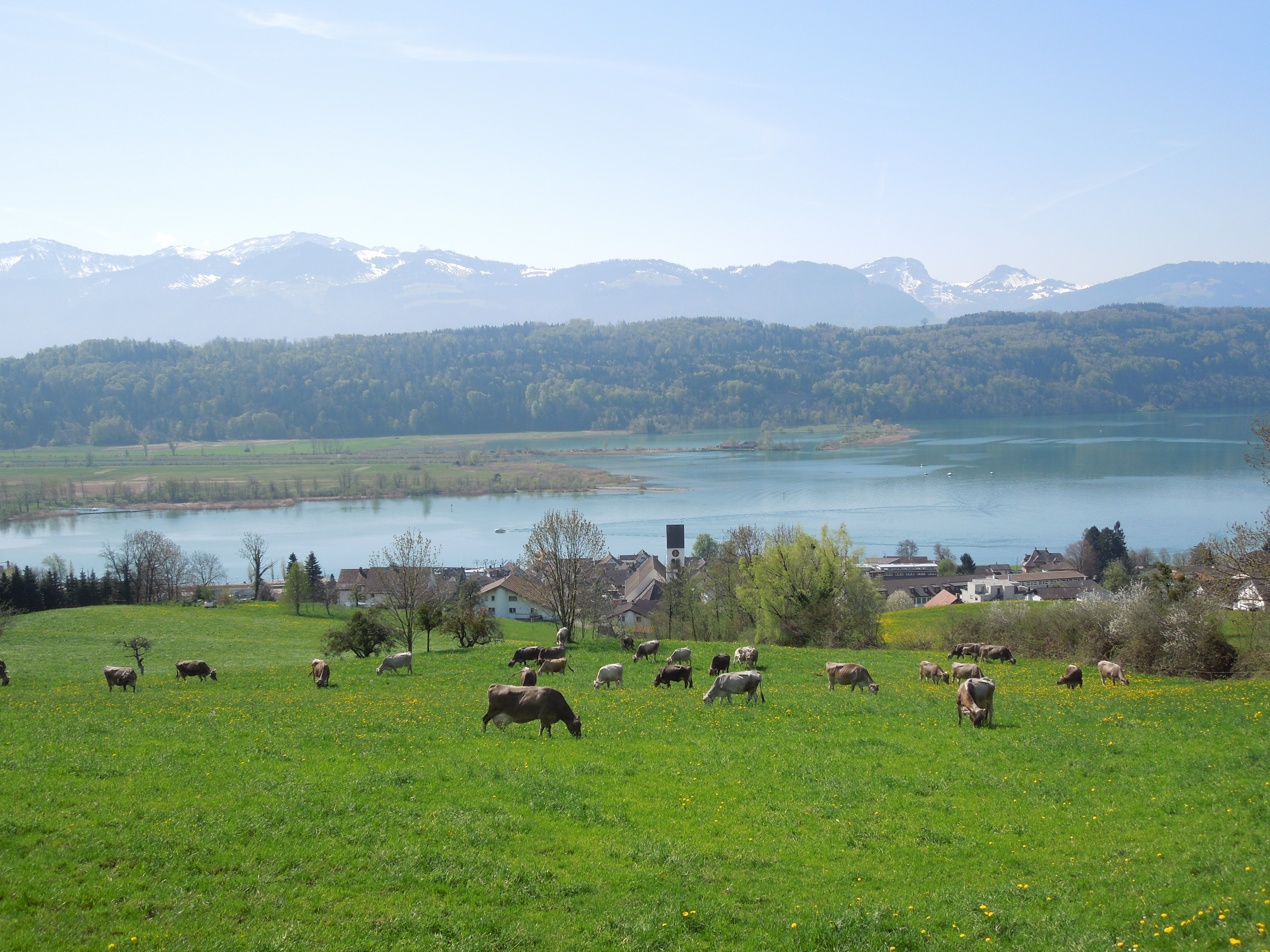 Schmerikon mit Linthmündung vom Goldberg aus gesehen, Frühjahr 2013